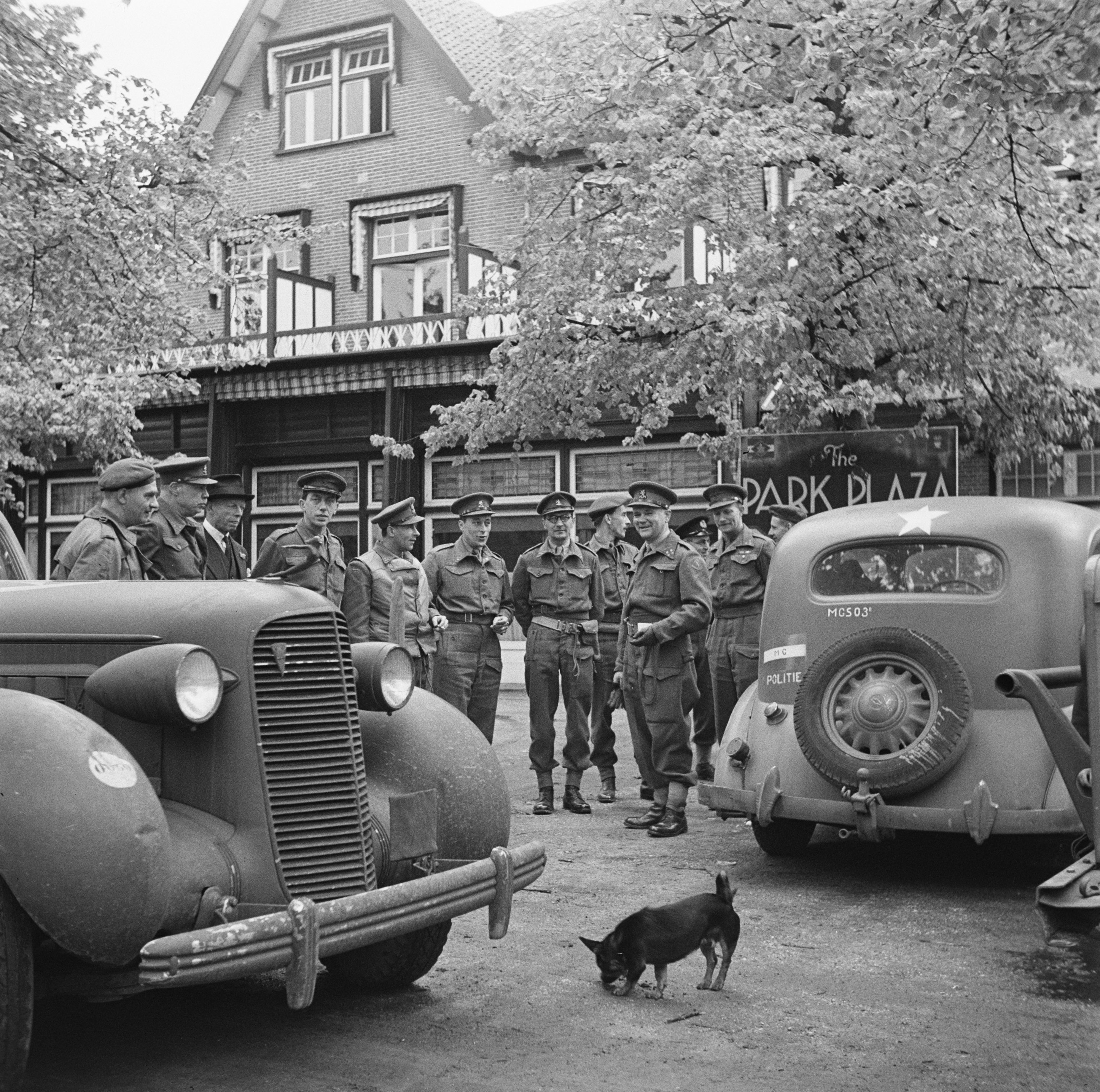 Collectie / Archief : Fotocollectie Anefo Reportage / Serie : Regering: Militair Gezag 't Loo [op doortocht naar West-Nederland (na de capitulatie)] Beschrijving : Het Militair Gezag op de Veluwe. De chef-staf van het M.G., Generaal mr. H.J. Kruls (2e van rechts) omringd door officieren. Datum : mei 1945 Trefwoorden : militairen Persoonsnaam : Kruls, H. J. Fotograaf : Poll, Willem van de / Anefo Auteursrechthebbende : Nationaal Archief Materiaalsoort : Negatief (zwart/wit) Nummer archiefinventaris : bekijk toegang 2.24.01.03 Bestanddeelnummer : 900-2814